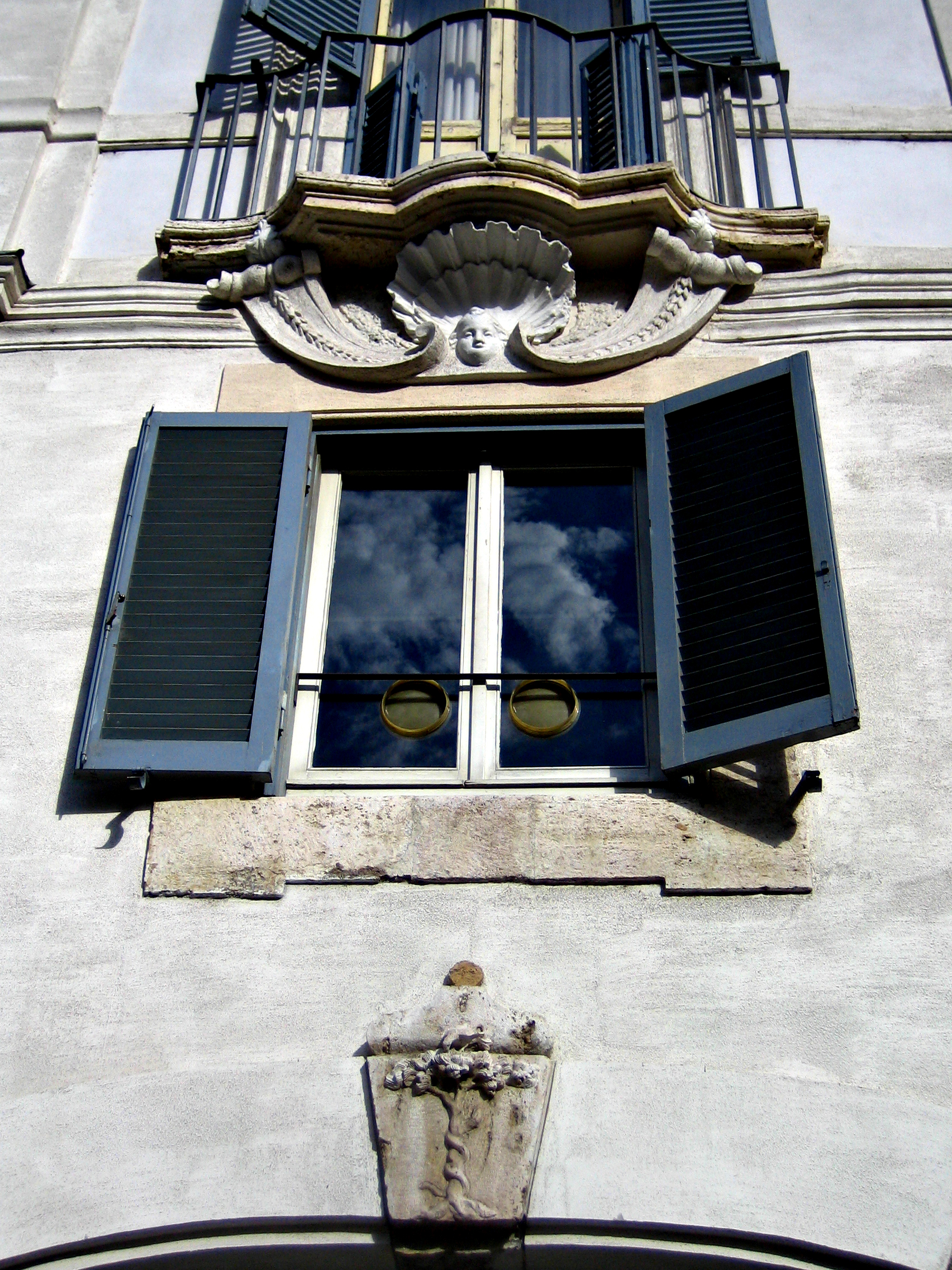 A reflection in a window of the rococo palazzo del Gallo di Roccagiovane in piazza Farnese.